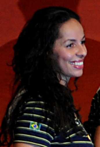 A jogadora de voleibol Paula Pequeno na 3ª Conferência Nacional do Esporte.